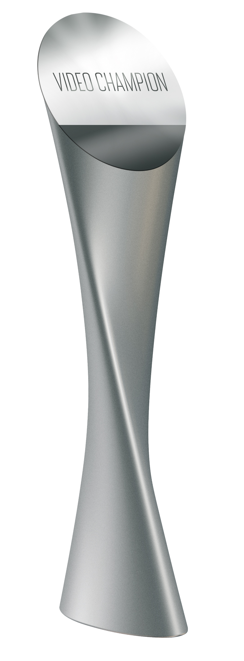 Video Champion 2016